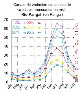 Curva de Variación Estacional Pangal en Pangal. == Data == # Dirección General de Aguas, MOP # Cuenca del río Rapel # Diagnóstico y clasificación de los cursos y cuerpos de agua según objetivos de calidad # Diciembre 2004 # pág. 55 # Tabla 4.2: Pangal en Pangal (m3/s) abr 10.884 9.631 8.304 6.256 4.413 3.595 may 6.911 6.375 5.726 4.485 2.957 2.059 jun 9.734 8.579 7.281 5.075 2.791 1.640 jul 14.928 12.430 9.783 5.799 2.621 1.489 ago 9.600 9.100 7.650 5.400 4.300 2.500 sep 15.078 12.856 10.539 7.040 3.931 2.521 oct 25.282 23.165 20.601 15.700 9.664 6.118 nov 50.282 46.383 41.660 32.634 21.516 14.986 dic 66.175 59.197 51.319 38.145 25.285 19.334 ene 61.587 53.345 44.825 32.143 21.339 16.776 feb 28.597 25.756 22.690 17.809 13.215 11.090 mar 17.414 16.022 14.336 11.113 7.144 4.813 == Script == #!/usr/bin/gnuplot # G N U P L O T Version 5.2 patchlevel 2 last modified 2017-11-01 # + lugar = "en Pangal" rio = "Pangal" year = "2004" diagrama = "Pangal en Pangal.png" datos = "pangal-en-pangal.txt" reset set loadpath 'gnuplot-palettes-master/' set terminal png truecolor size 700, 300 font "Helvetica" background rgb "white" set margins 6,3,2,4 # , , , set output diagrama set grid set yrange [0:] set title "Caudales medios mensuales [m^3/s] \npara distintas probabilidades de excedencia\nRío ".rio." (".lugar.") ".year set xtics offset 0,graph -0.09 rotate by 45 set style data line load 'moreland.pal' plot datos \ using 2:xticlabels(1) title "5%" w lp , \ using :3 title "10%" w lp , \ using :4 title "20%" w lp , \ using :5 title "50%" w lp , \ using :6 title "85%" w lp , \ using :7 title "95%" w lp